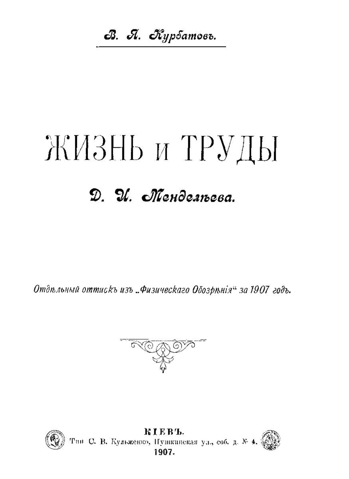 Обложка книги «Курбатов В. Я. Жизнь и труды Д. И. Менделеева», изданной С. В. Кульженко